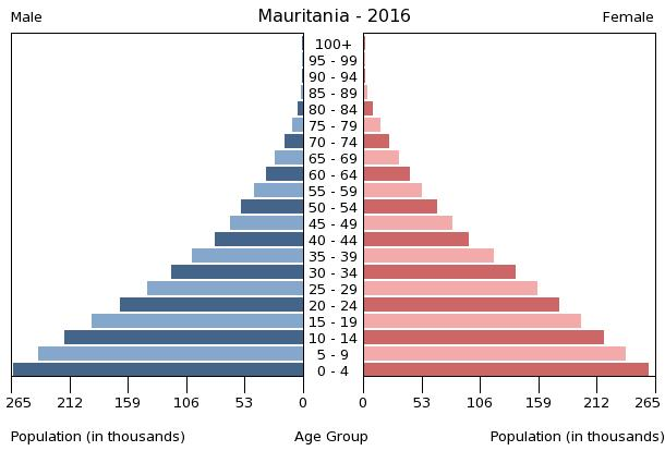 A population pyramid illustrates the age and sex structure of a country's population and may provide insights about political and social stability, as well as economic development. The population is distributed along the horizontal axis, with males shown on the left and females on the right. The male and female populations are broken down into 5-year age groups represented as horizontal bars along the vertical axis, with the youngest age groups at the bottom and the oldest at the top. The shape of the population pyramid gradually evolves over time based on fertility, mortality, and international migration trends.